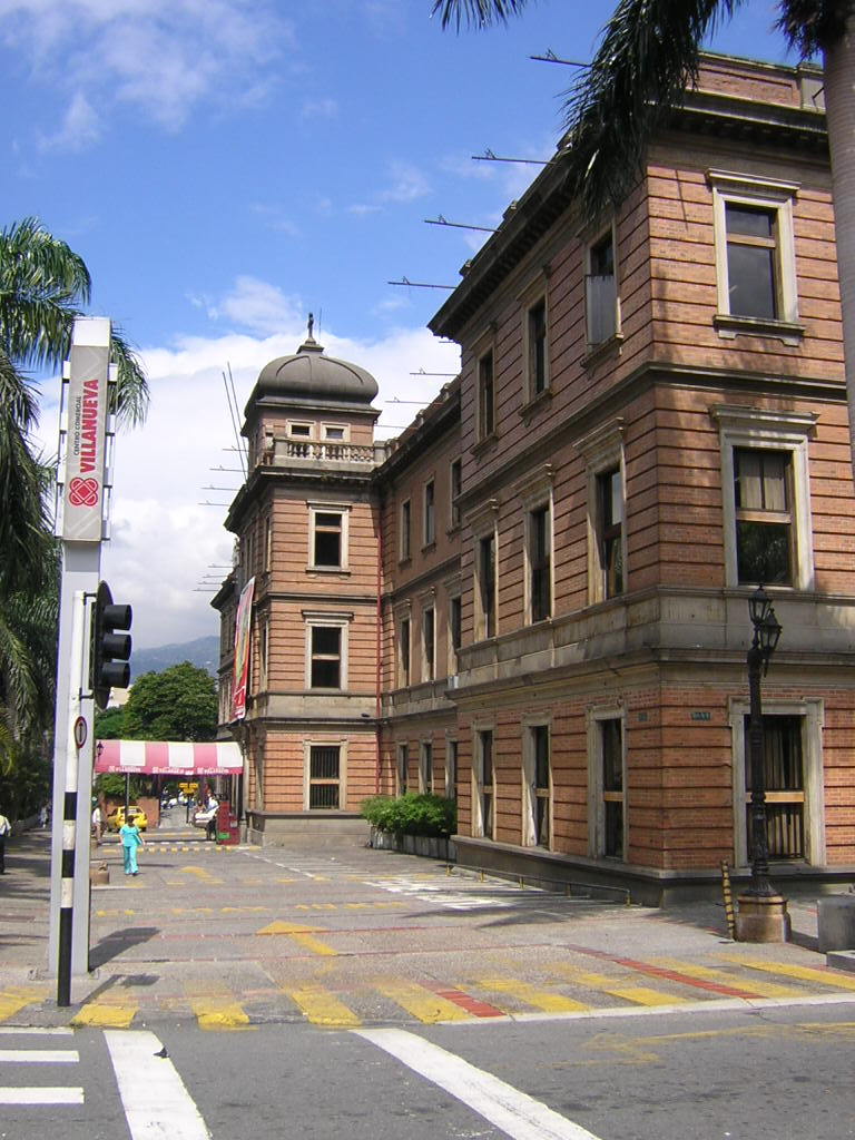 Centro Comercial Villanueva, Medellín, Colombia